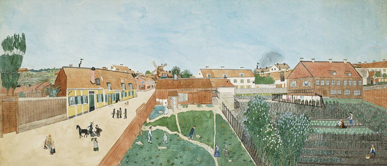 Högbergsgatan med kvarnen Brinkan i bakgrunden, målat av Josabeth Sjöberg